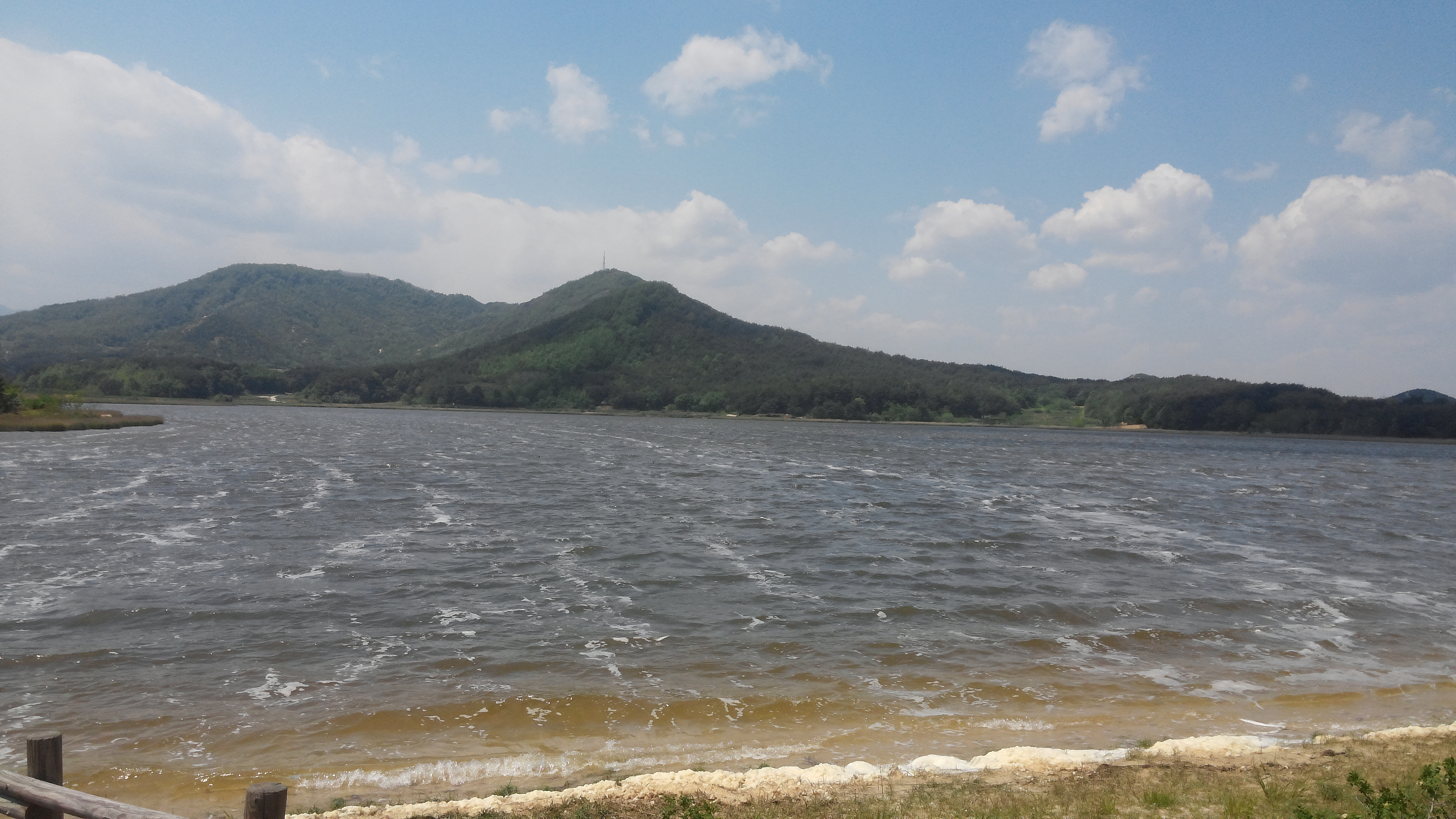 송지호.